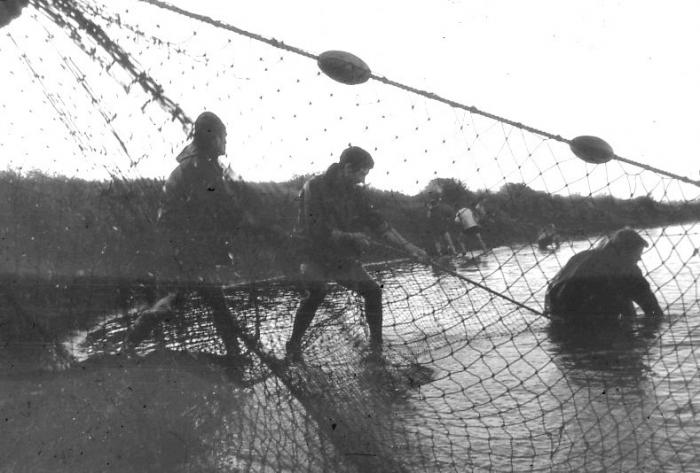 גן-שמואל - הדייגים מושכים רשת בברכות הדגים 1965-70.